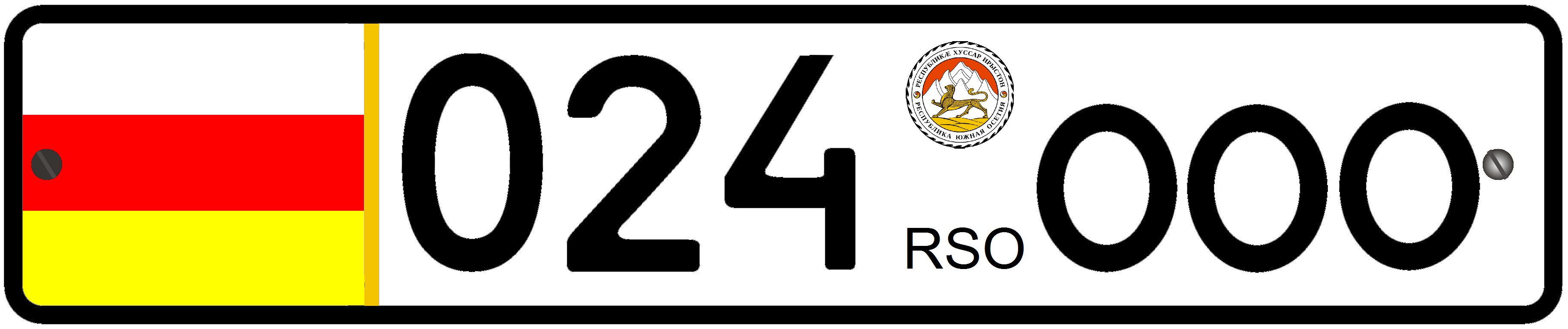 Автомобильный номер ГСО Южной Осетии